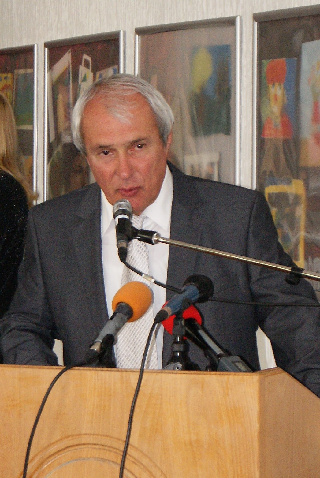 Српски (ћирилица): Проф. др Зоран Момчиловић држи говор на свечаном пријему студената 1.10.2018. на Педагошком факултету у Врању.